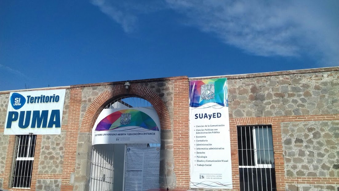 Entrada principal a las Instalaciones del SUAyED UNAM Tlaxcala